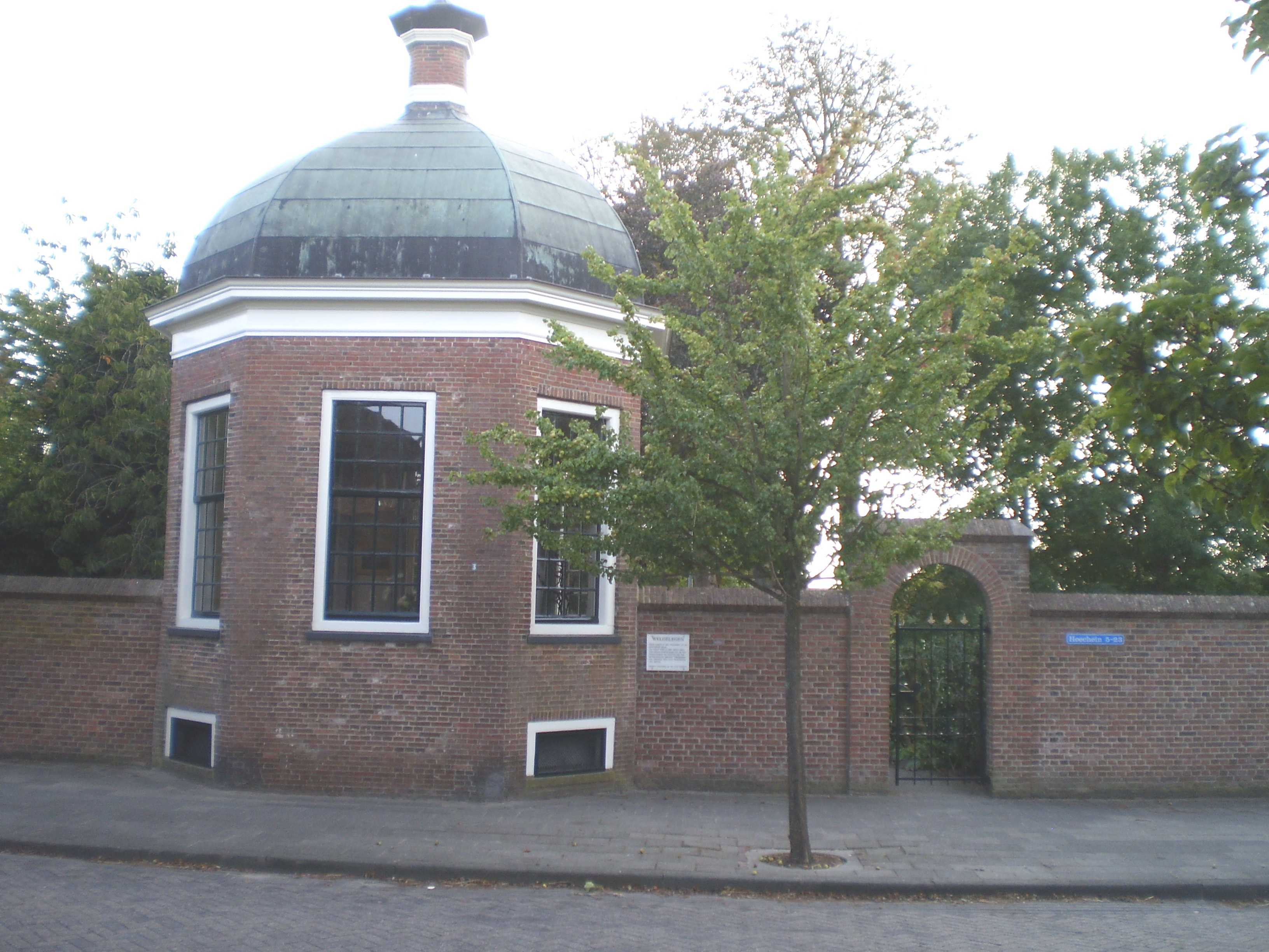 Teekoepel (Welgelegen, Akkrum)